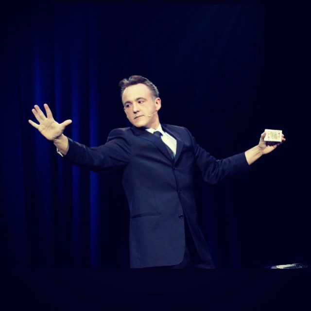 Photo de Norbert Ferré datant de 2016